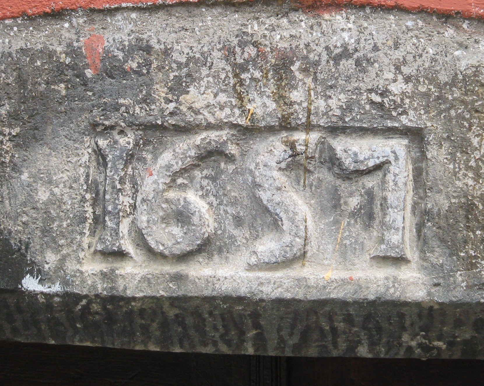 Dintell d'una casa de la Vall d'Aran amb la data de construcció (1657)